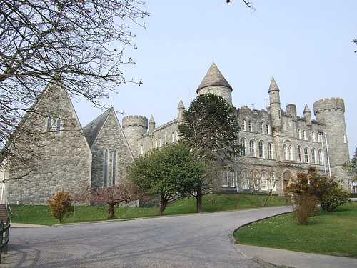 Saint Eunan's College, Letterkenny